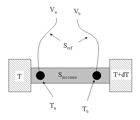 Schéma de principe de la mesure de coefficient Seebeck. dessin réalisé par Utilisateur:David Berardan Utilisateur:David Berardan